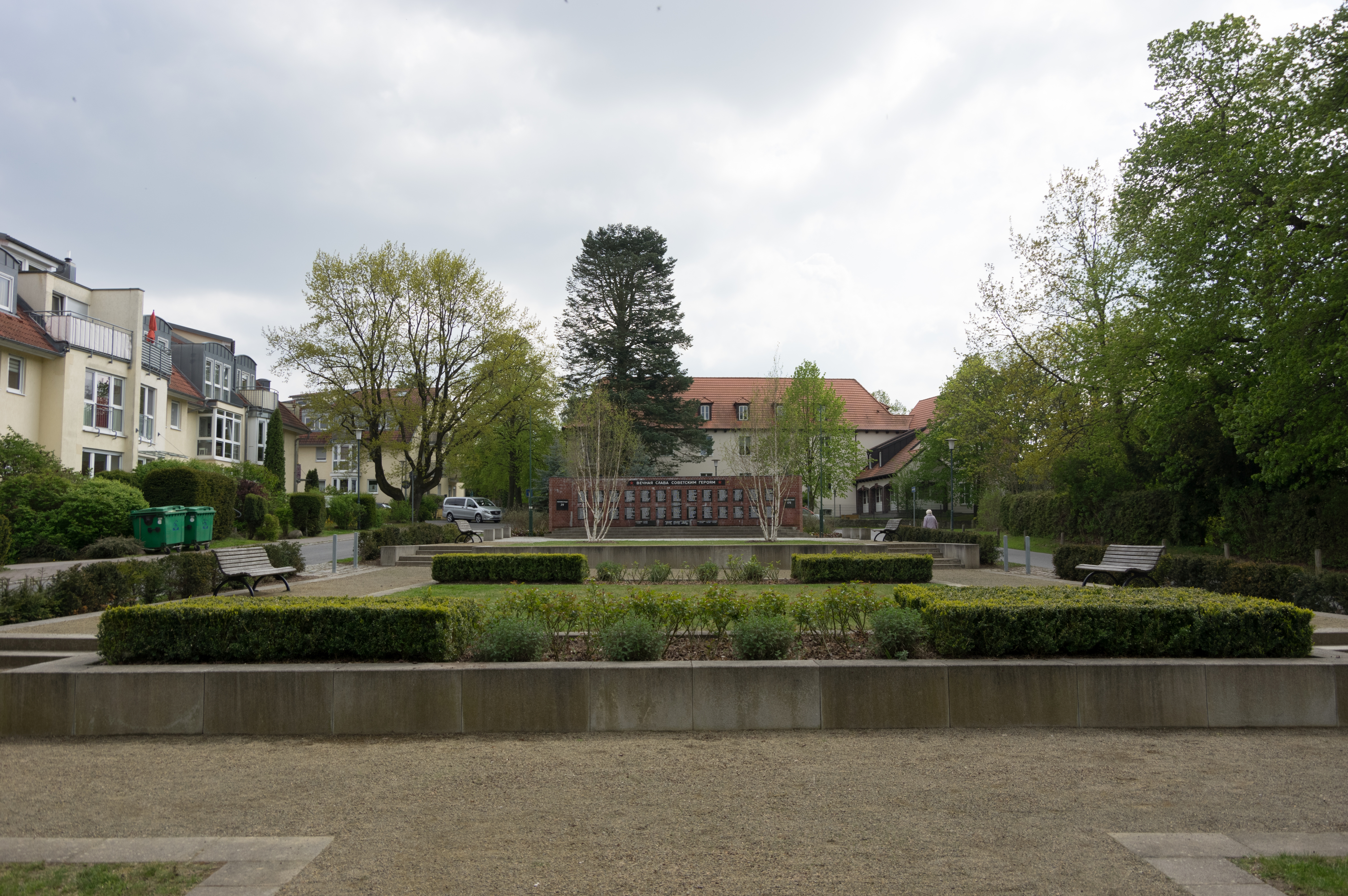 Zeuthen, Ortsteil Mirsdorf in Brandenburg. Das Sowjetisches Ehrenmal im Zentrum des Ortes steht unter Denkmalschutz.